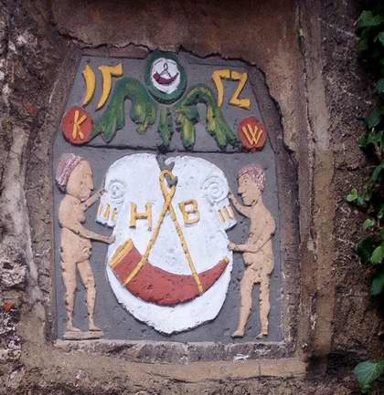 Hornburg hist Wappen